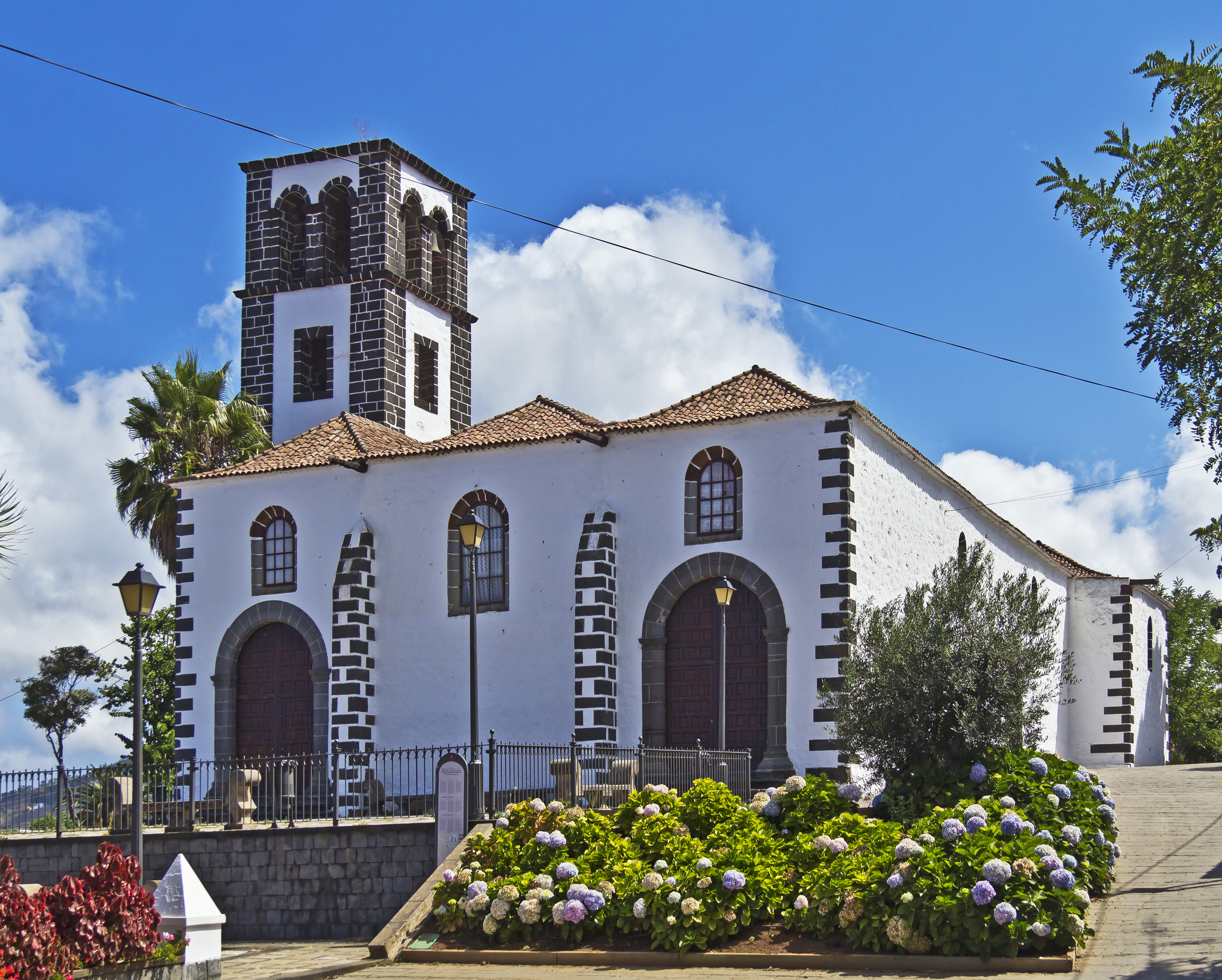 Kirche Santa Catalina in Tacoronte (Canarias)